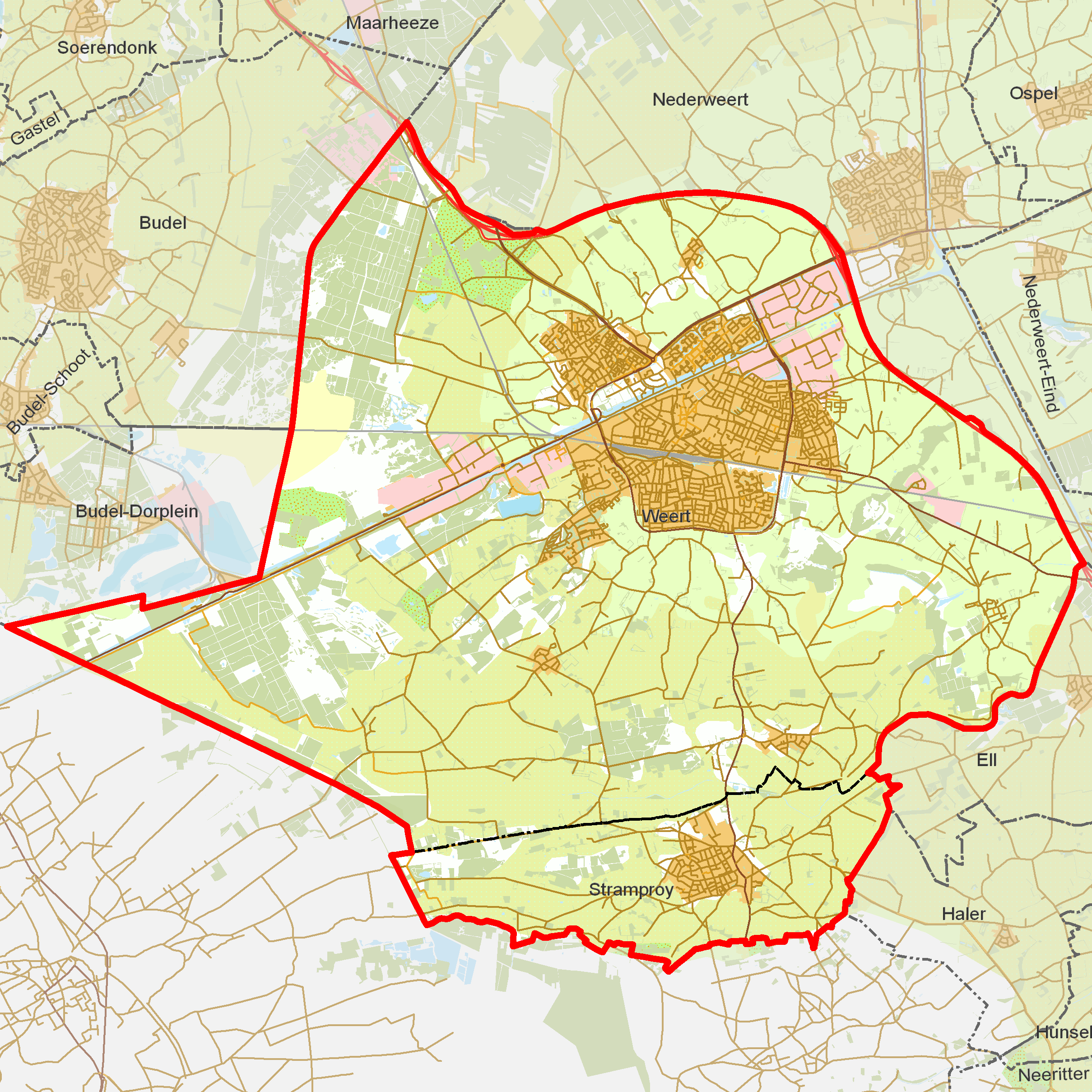 BAG woonplaatsen - Gemeente Weert.png